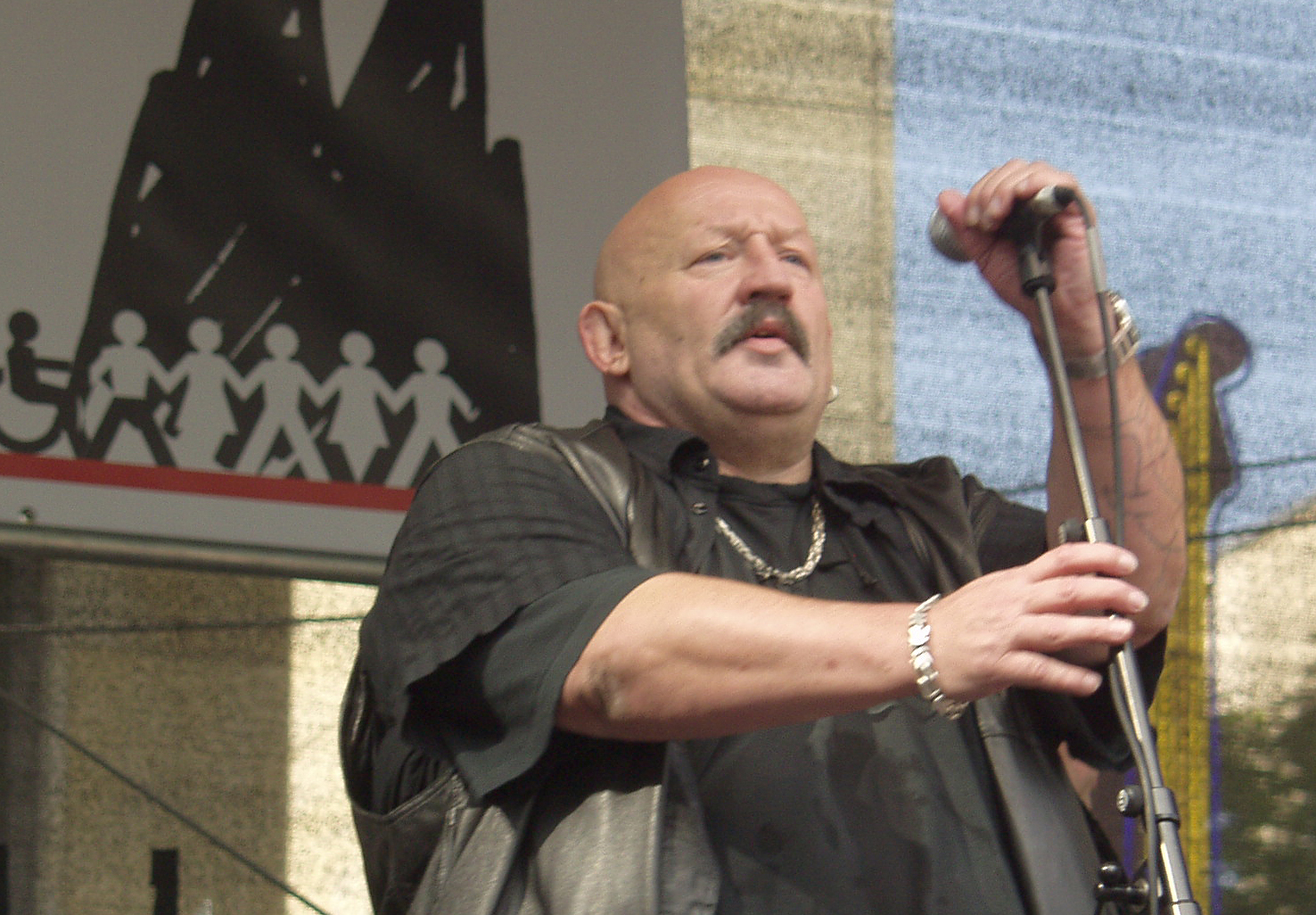 Jürgen Zeltinger auf der politischen Demonstration „Köln stellt sich quer“ gegen den so genannten „Anti-Islamisierungskongress“ der rechtsgerichteten Partei „Pro Köln“ vor dem Gürzenich in Köln.